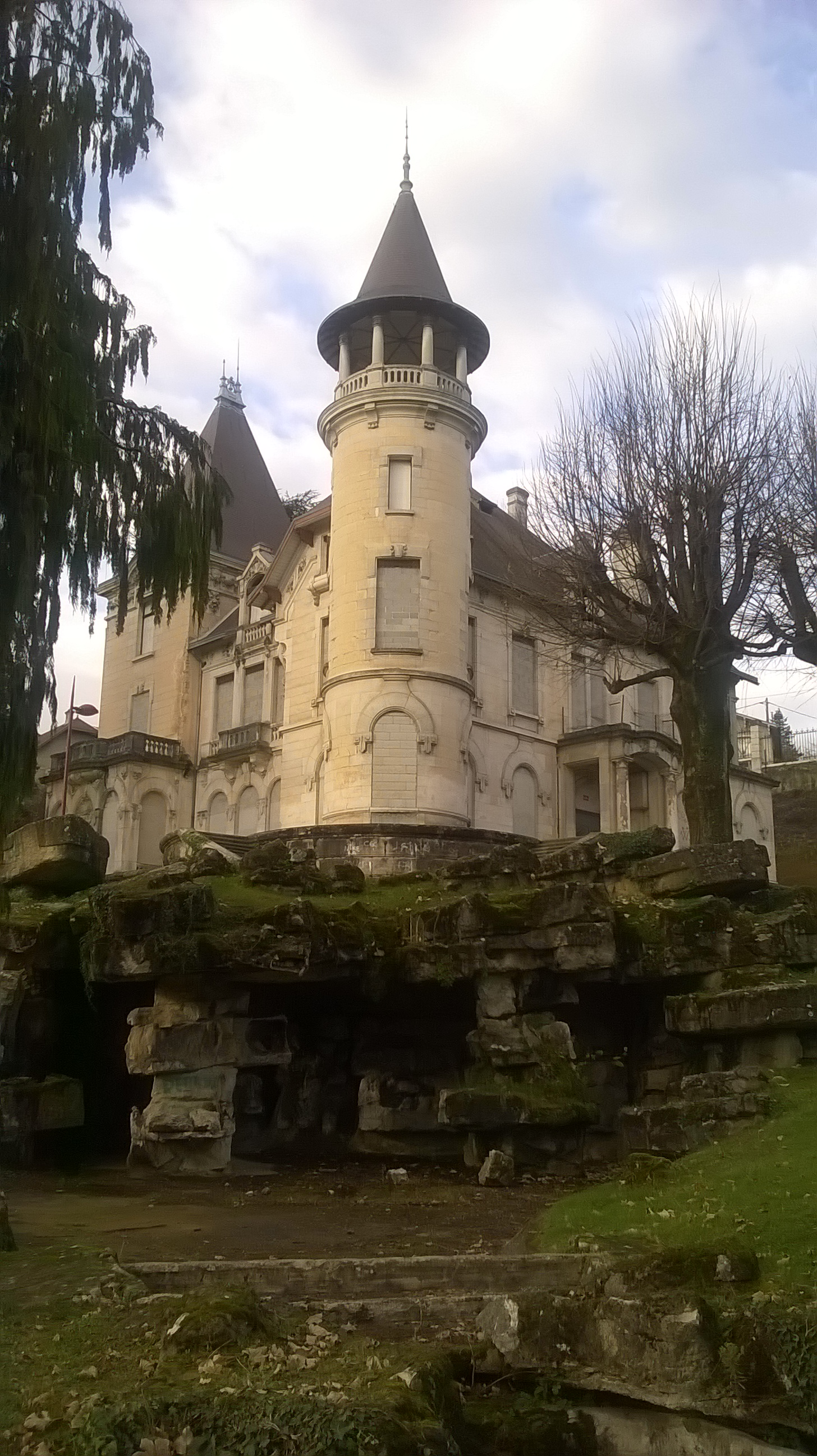 Château de L'orgère